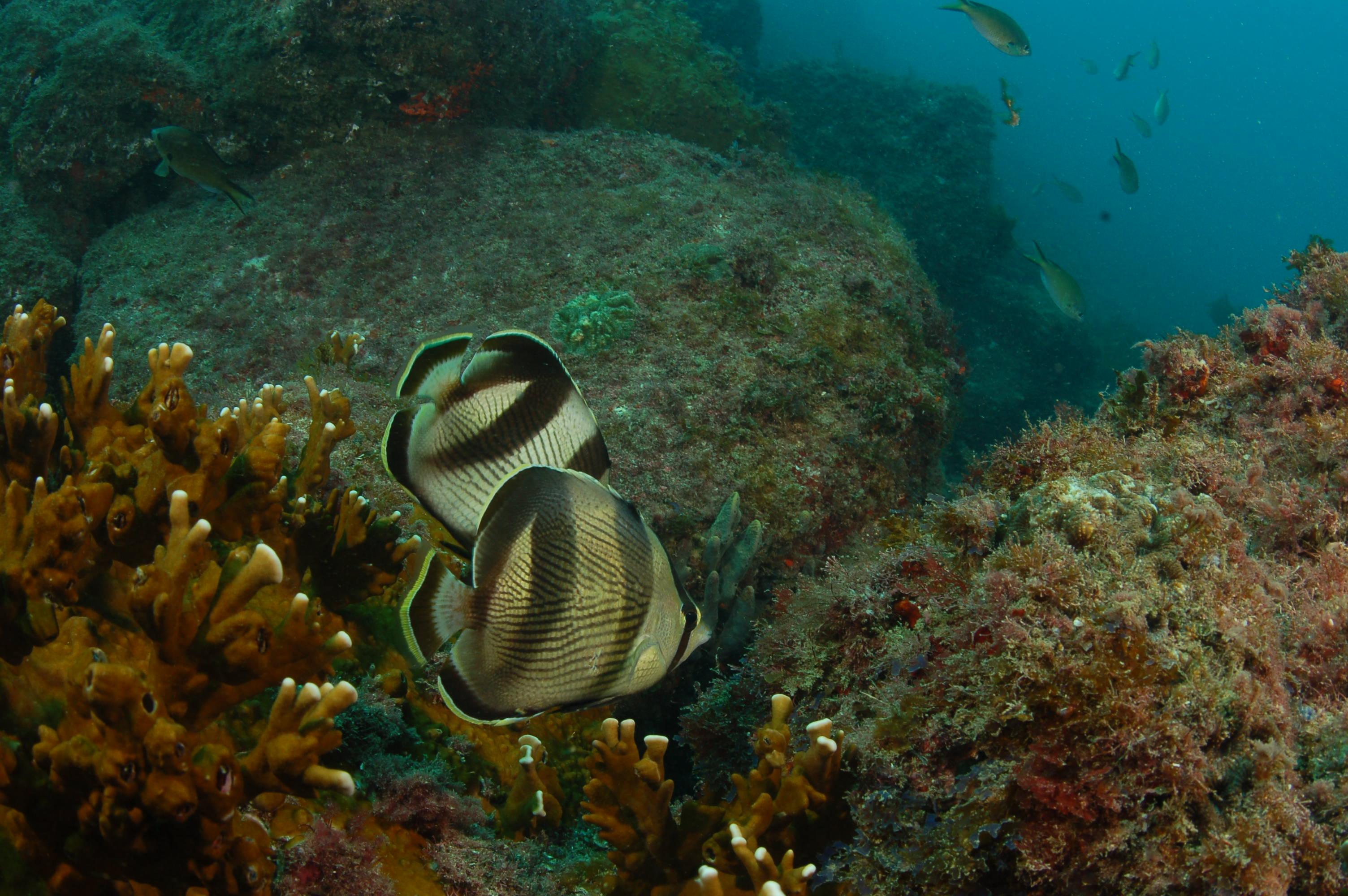 Peixes e Corais - Nilo - Recifes de Corais em Abrolhos